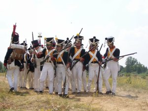 4 Regiment Piechoty rekonstrukcja Pułtusk bis 2006